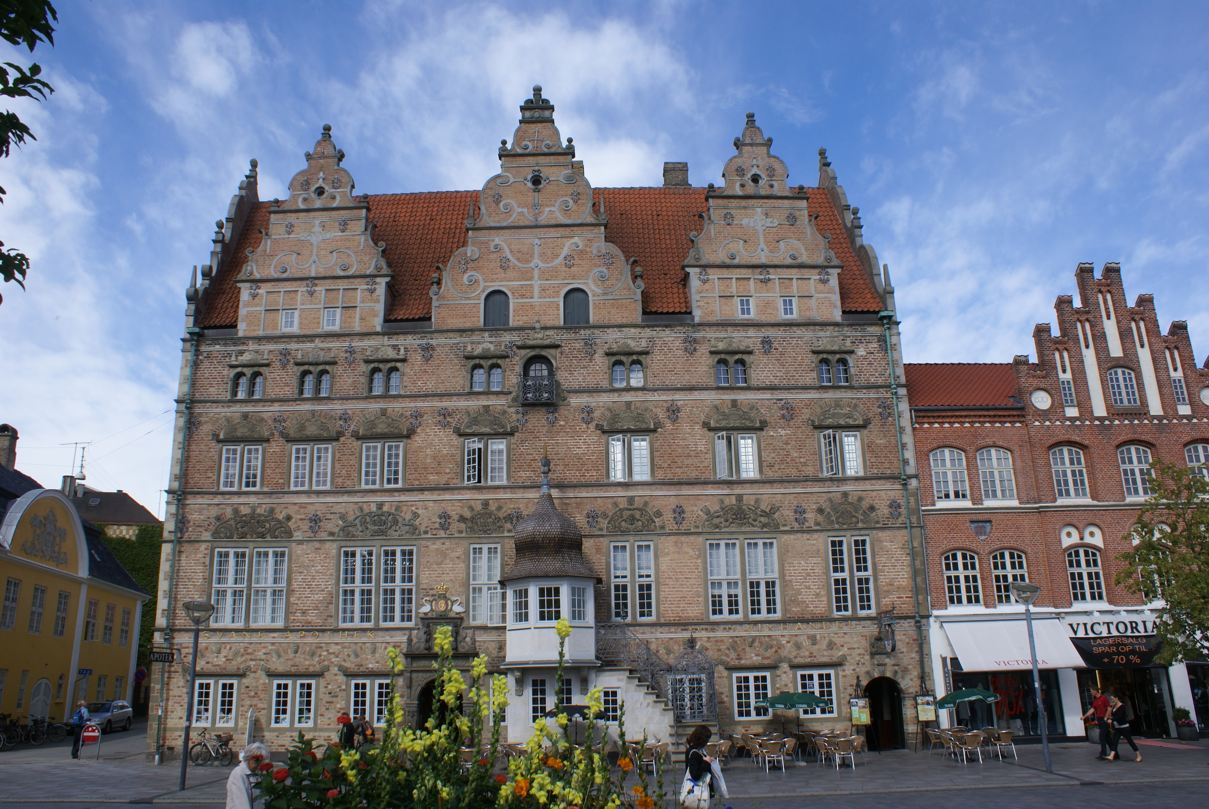 Jens Bangs Steinhaus in Aalborg